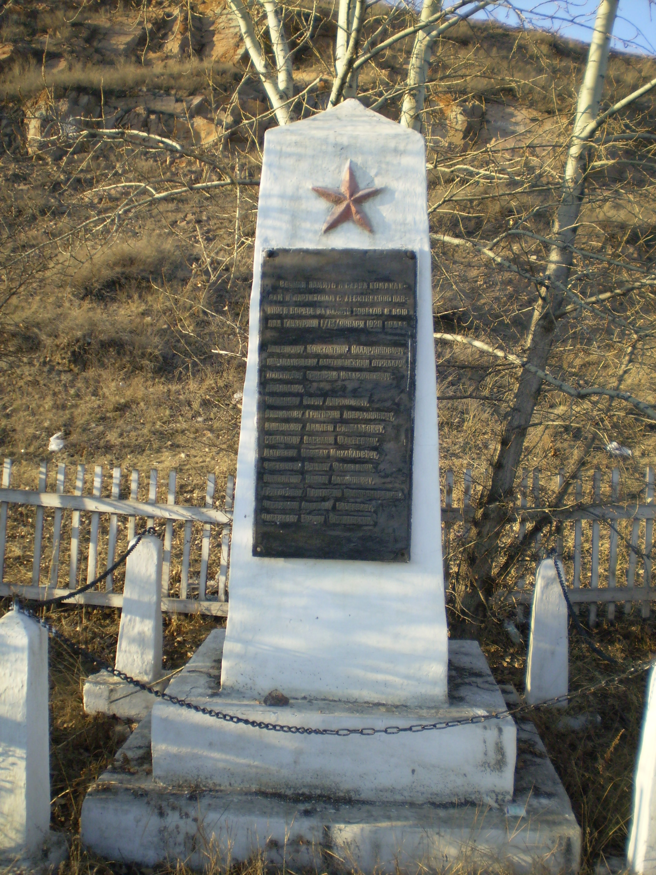 Памятник командирам и партизанам села Десятниково, павшим в борьбе за власть Советов в бою под Гамзурино 1-13 января 1920 года